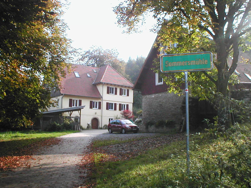 Sommersmühle im Fünfmühlental bei Bad Rappenau, Baden-Württemberg, Deutschland